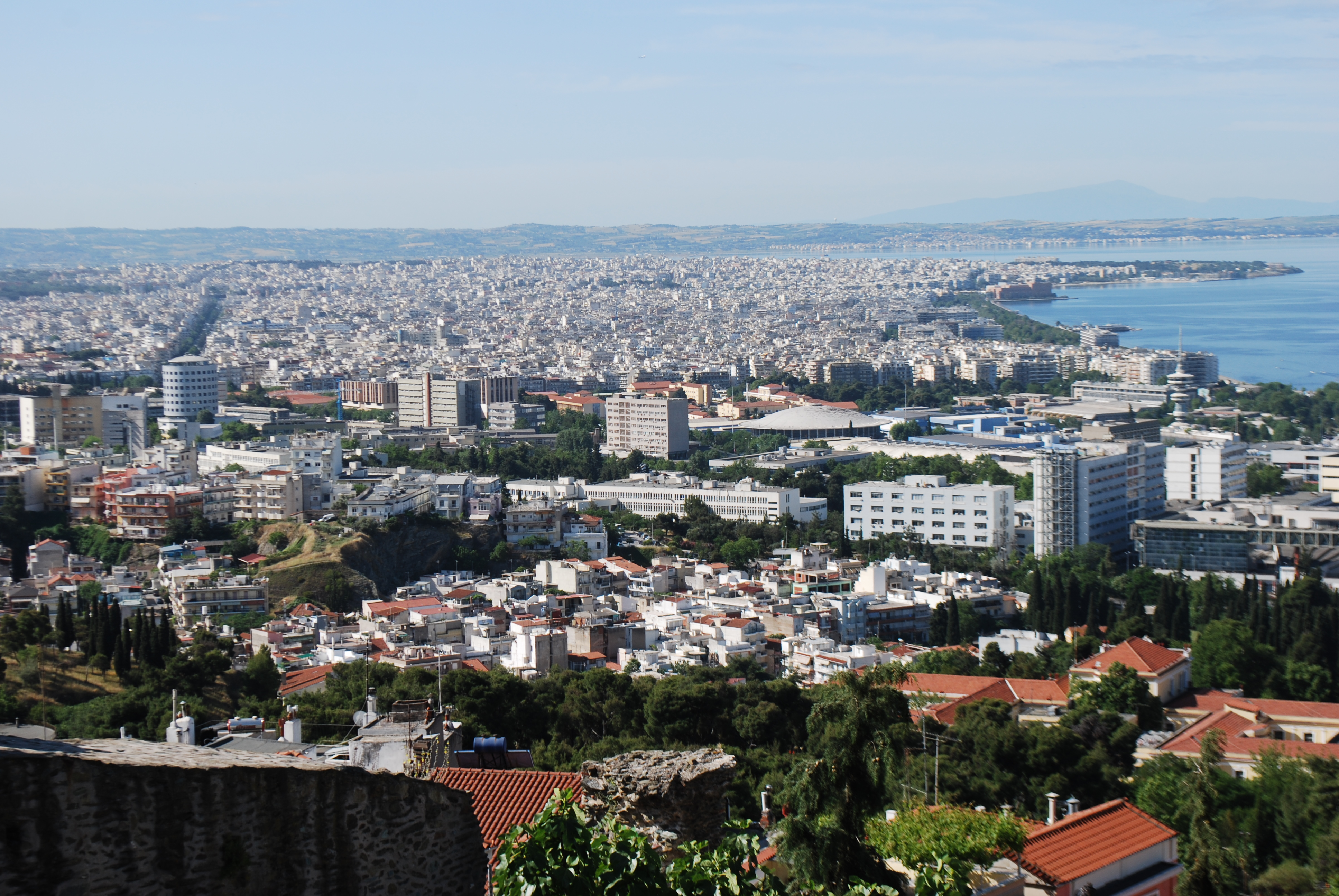 Vue de Thessalonique.